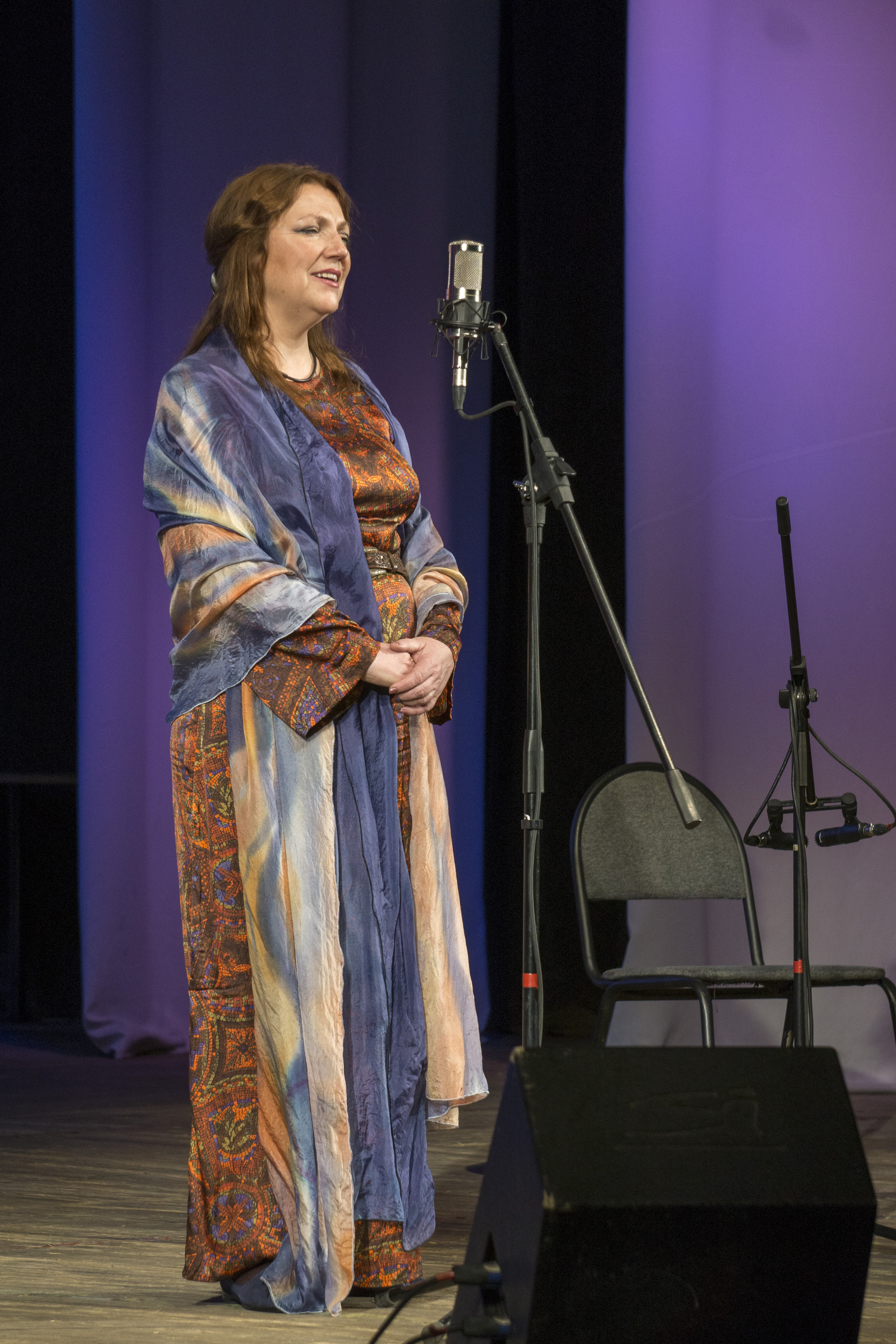 Евгения Смольянинова на концерте 7 ноября 2015 года в филармонии Тольятти